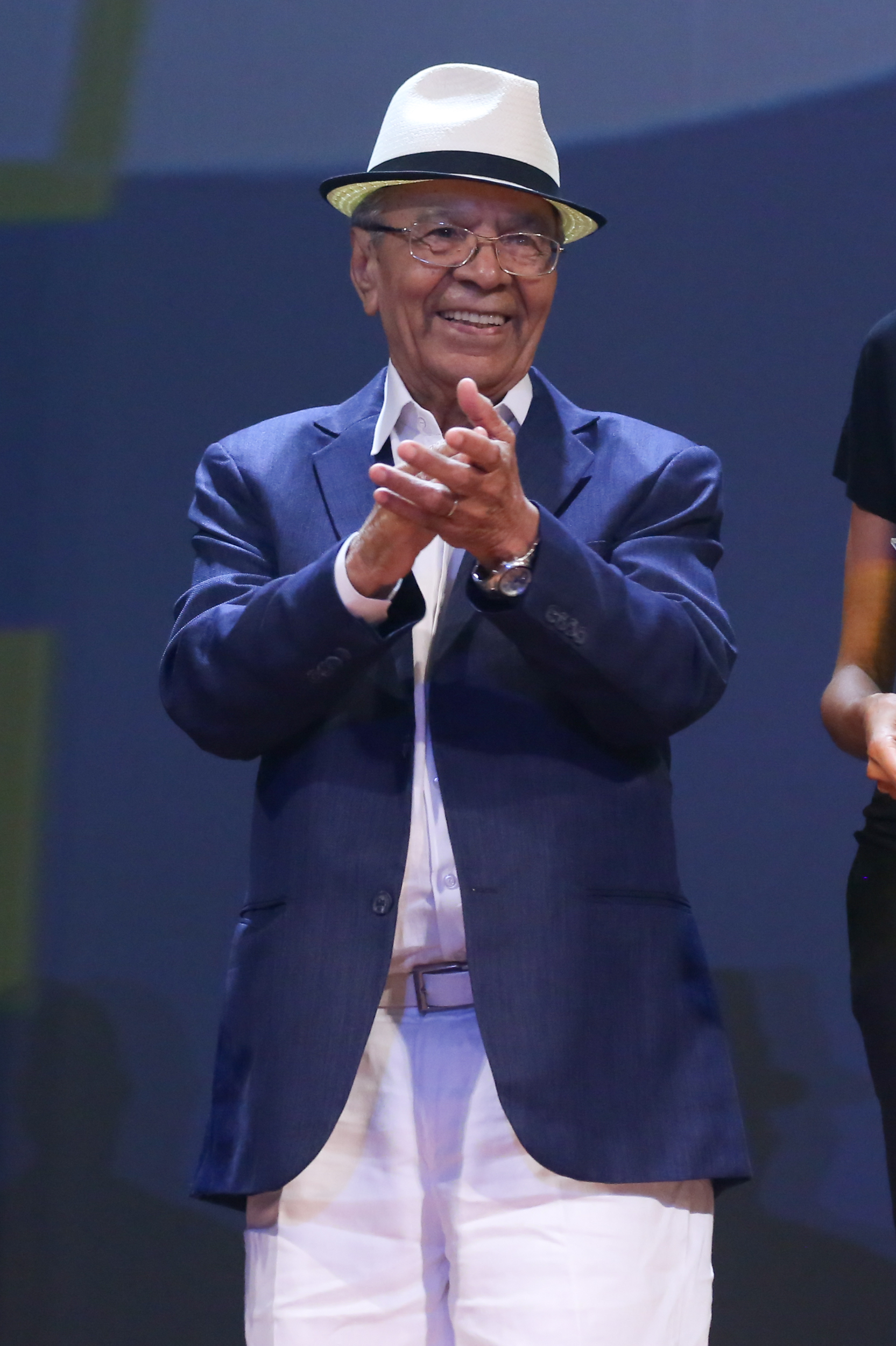 Prêmio Samba / Melhor Album - Passado de Glória - Monarco 80 Anos - 26° Prêmio da Música Brasileira 2015, no Theatro Municipal, no Centro do Rio de Janeiro/RJ. (10/06/15) Foto: Roberto Filho/Divulgacão